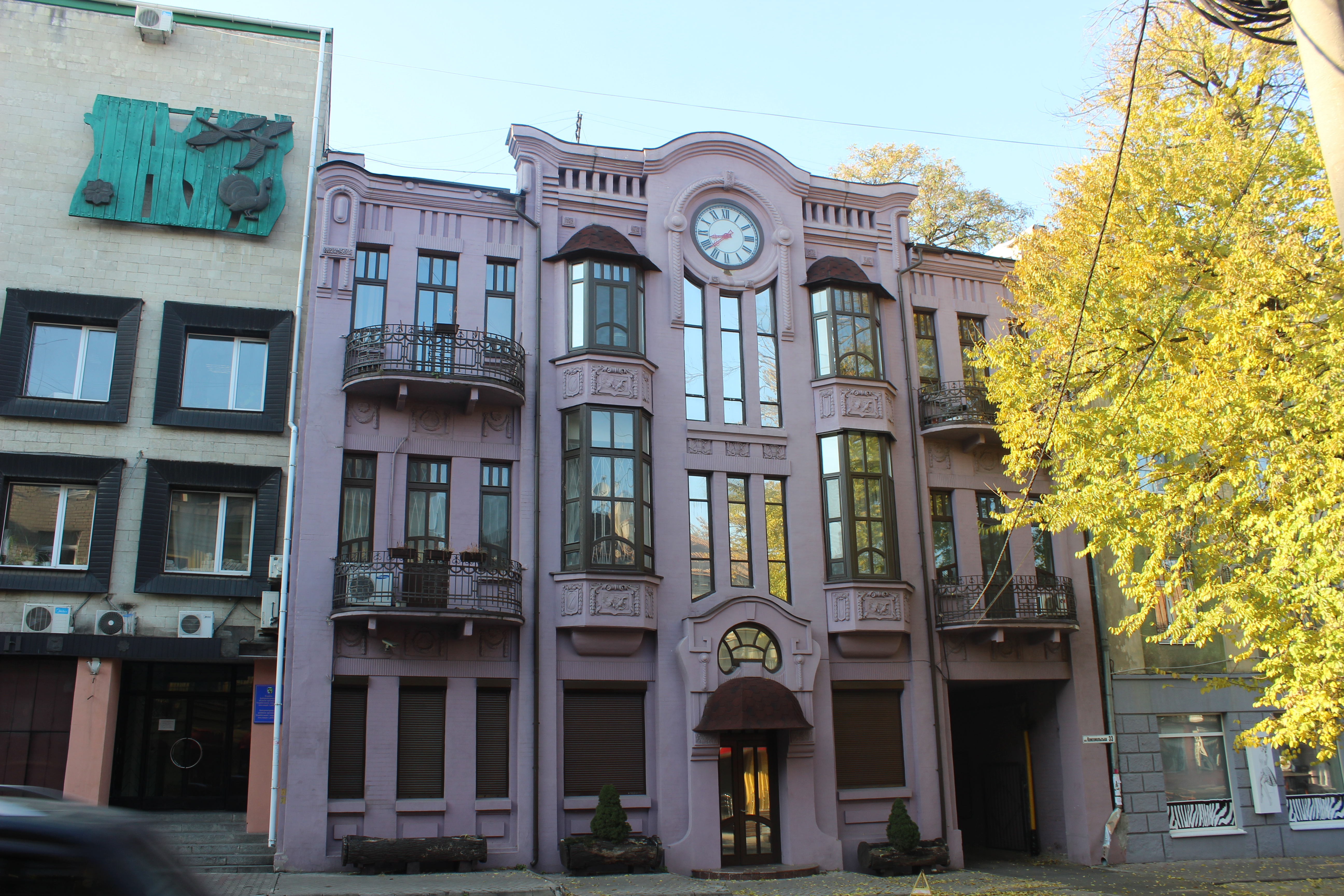 Доходний будинок, Дніпро, вул. Старокозацька, 33